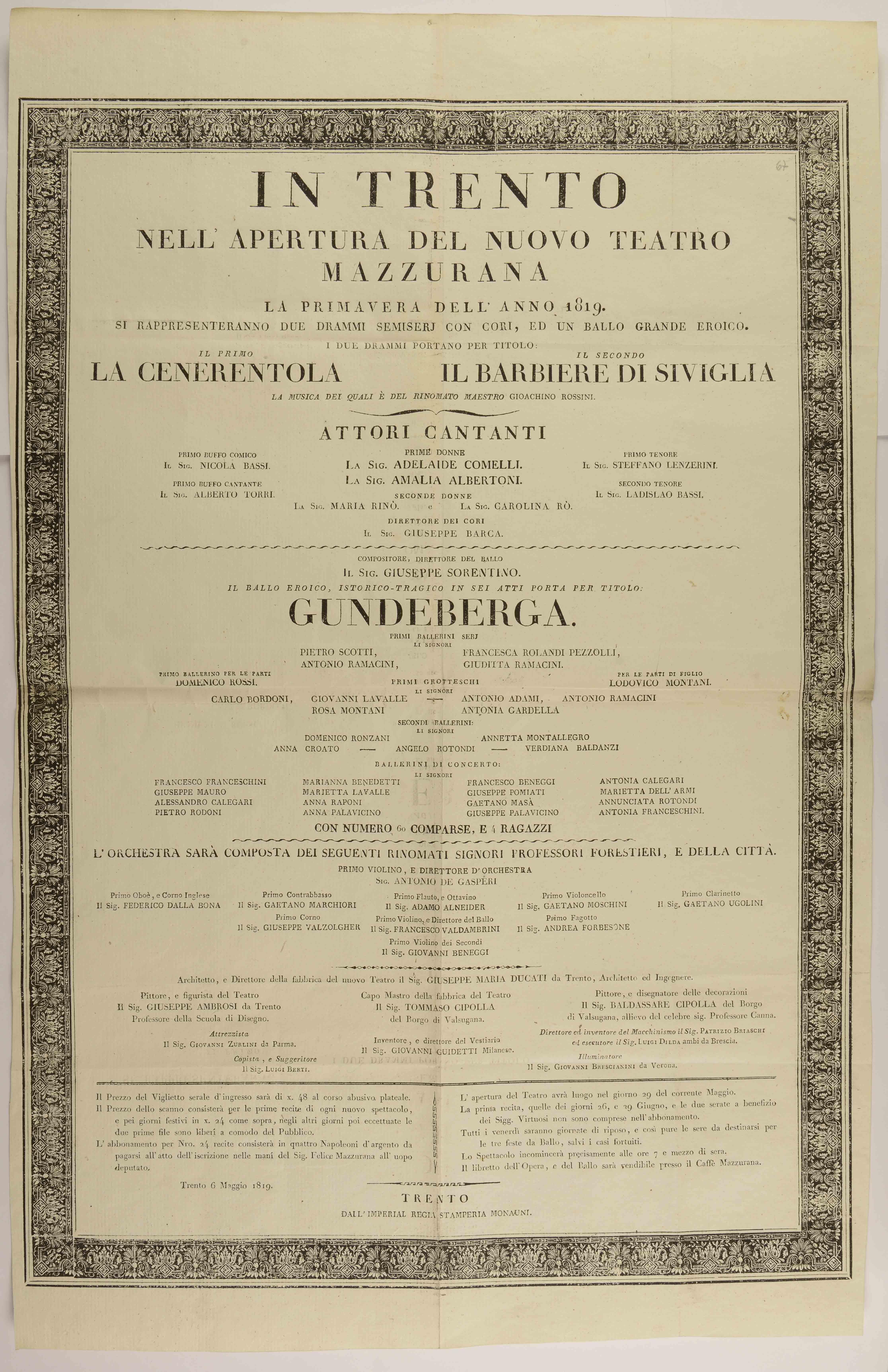 Manifesto teatrale.